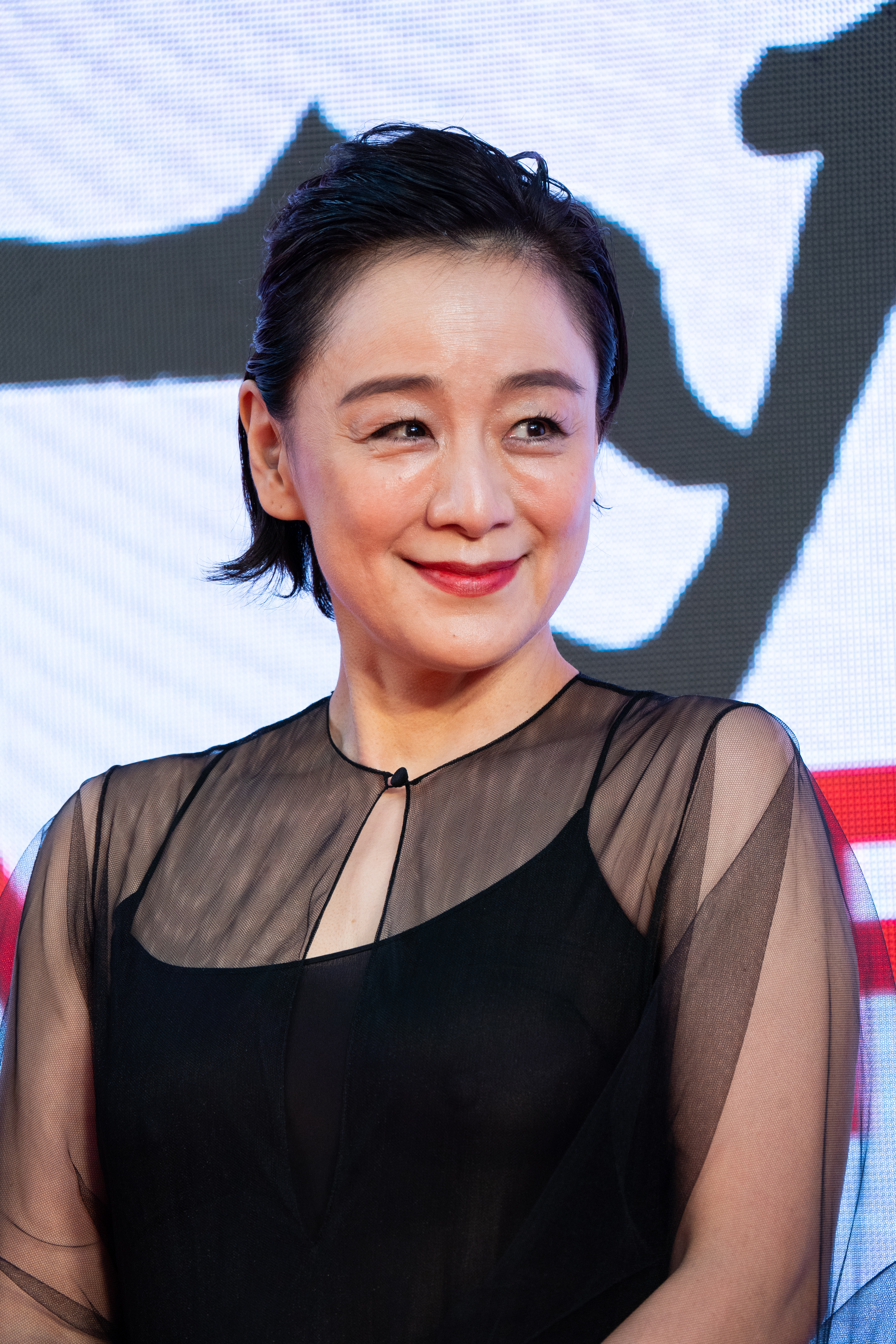 第32回 東京国際映画祭 オープニングセレモニー 神野三鈴 (フォークロア TATAMI)